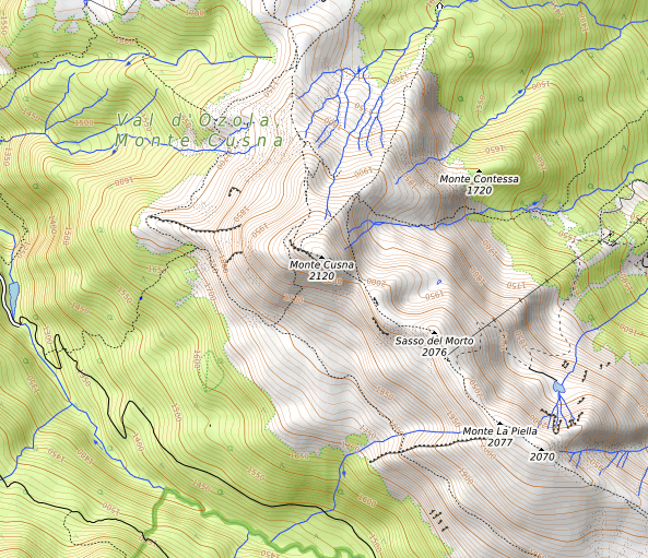 carte réalisée sur umap This map may be incomplete, and may contain errors. Don't rely solely on it for navigation.